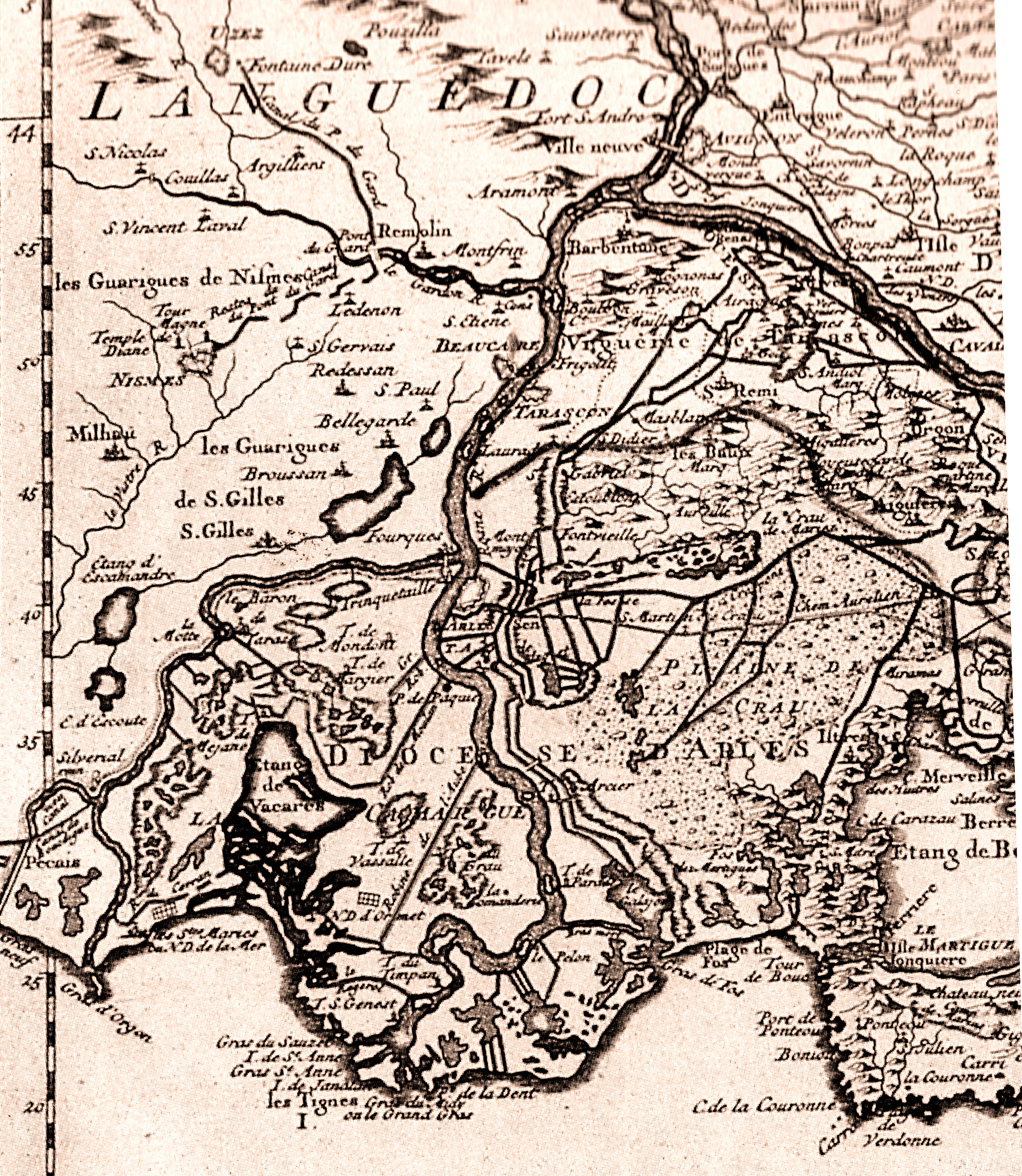 Carte de la Camargue par Guillaume Delisle